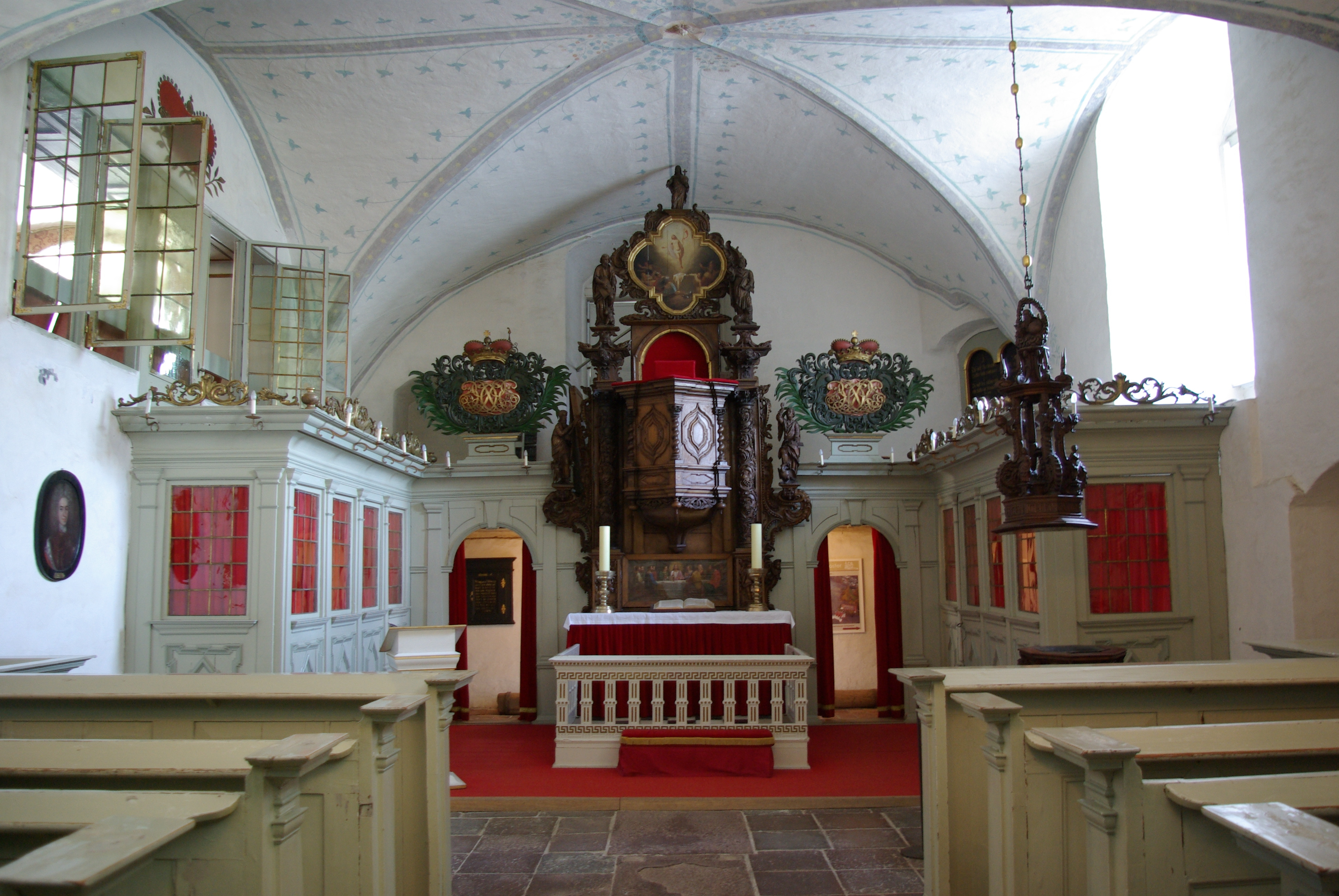 Glücksburg in Schleswig-Holstein. Die Kapelle im Schloss Glücksburg steht unter Denkmalschutz.